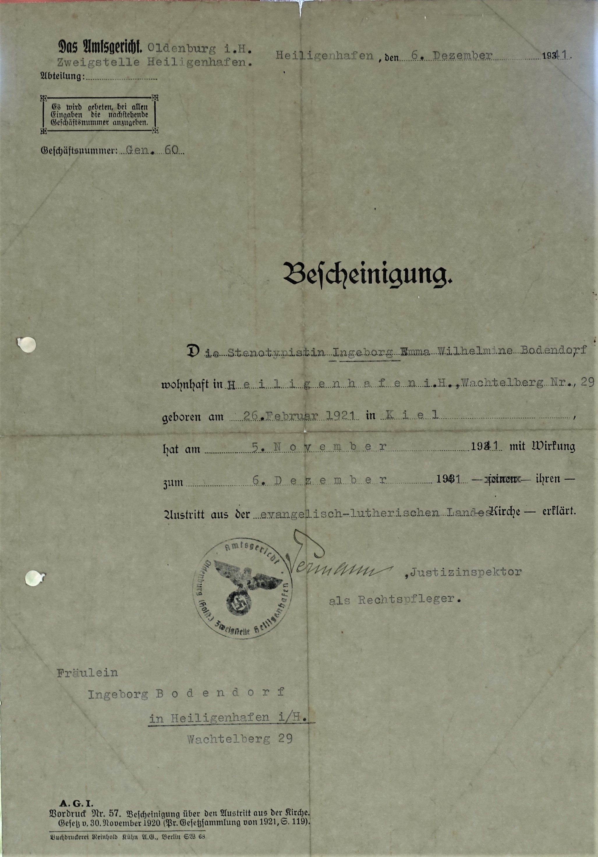 Bescheinigung über den Kirchenaustritt von 1941